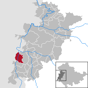 Unterbreizbach in Thuringia - Wartburgkreis